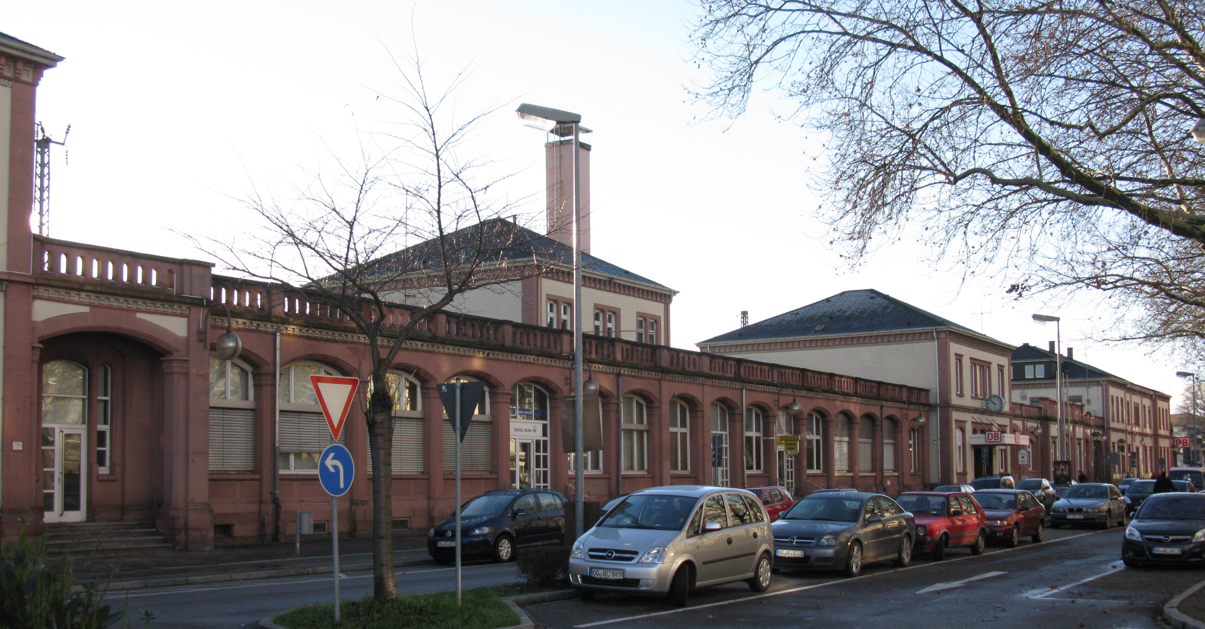 Hauptbahnhof Offenburg, erbaut nach Plänen von Friedrich Eisenlohr